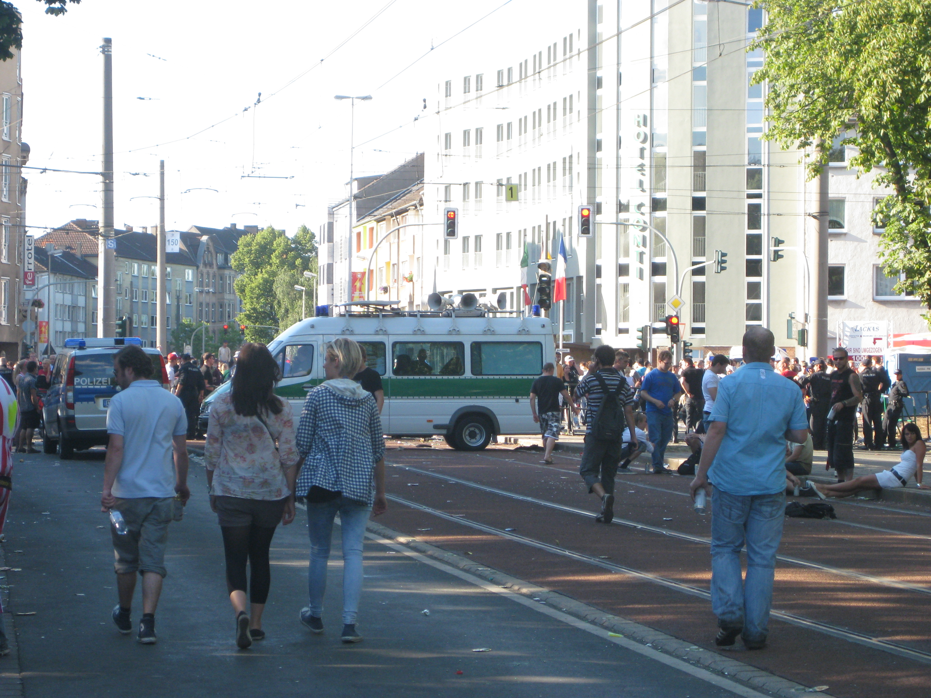 Lautsprecherkraftwagen der Polizei auf der Düsseldorfer Straße/Ecke Mercatorstraße in Duisburg, kurz nach dem Unglück bei der Loveparade 2010.